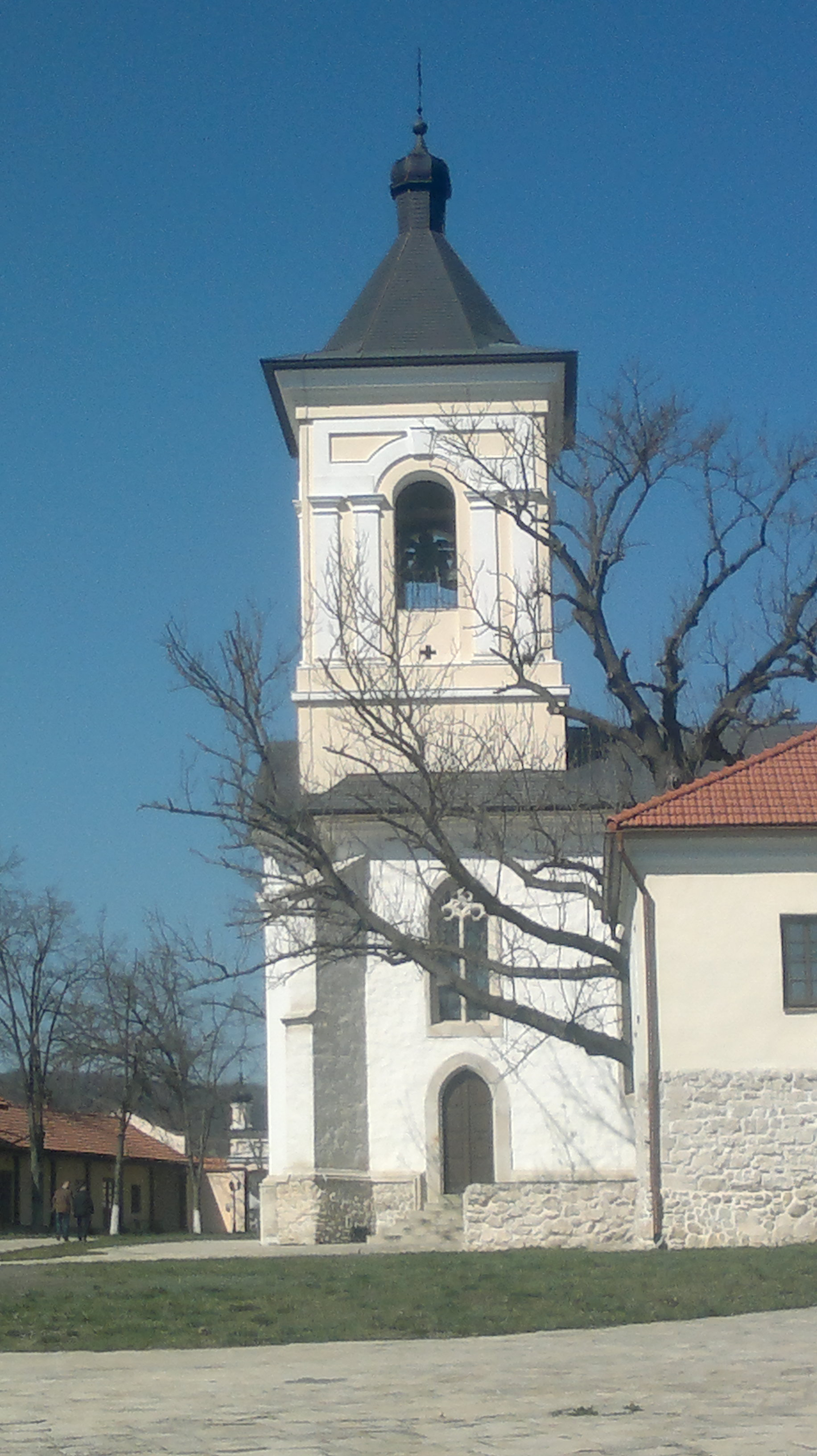 Mănăstirea Căpriana, raionul Strășeni, Republica Moldova.